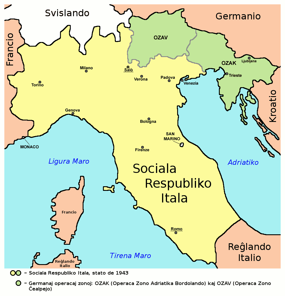 Karte der Italienischen Sozialrepublik, Beschriftung in Esperanto